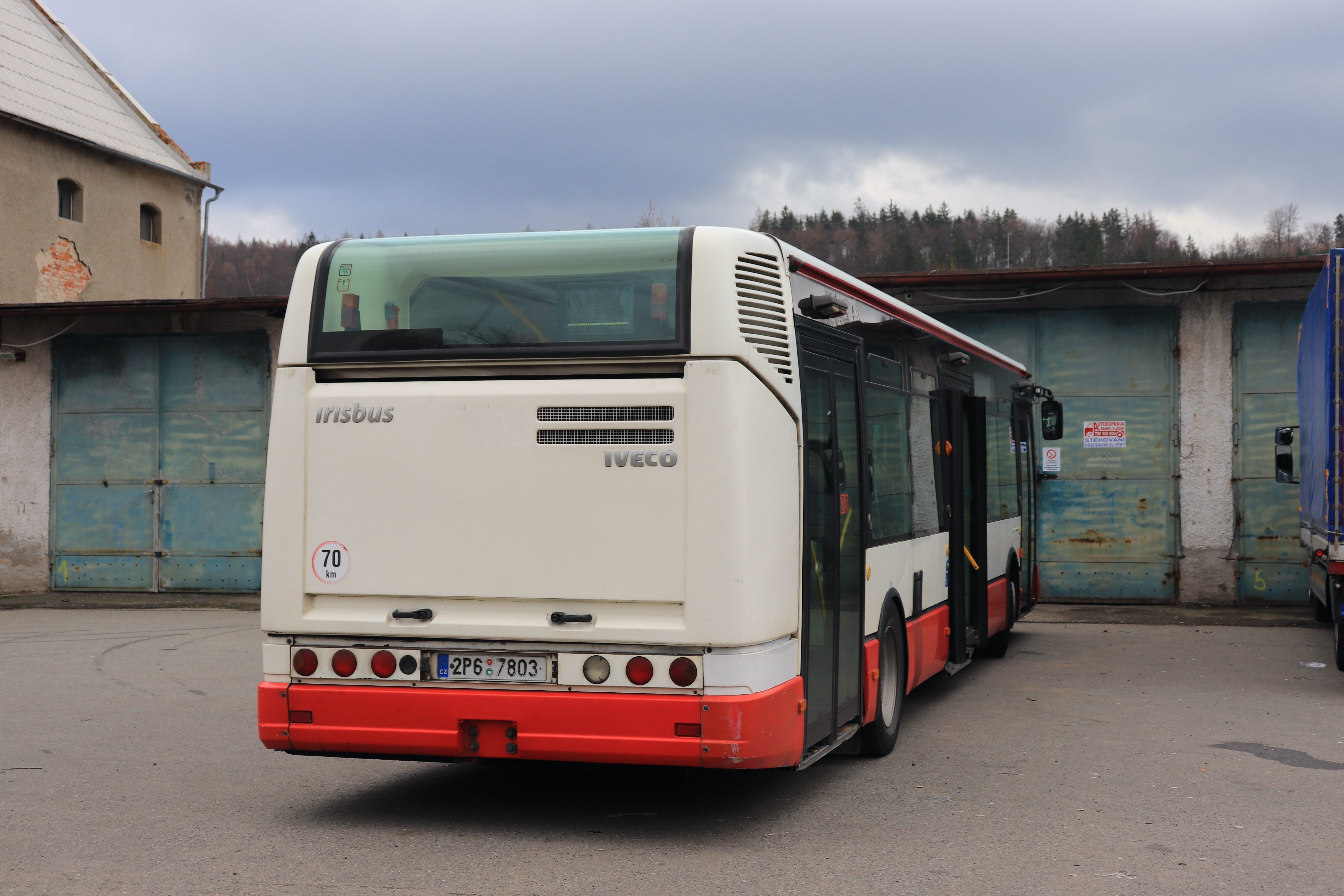 Zadní partie původem plzeňského vozu 491.